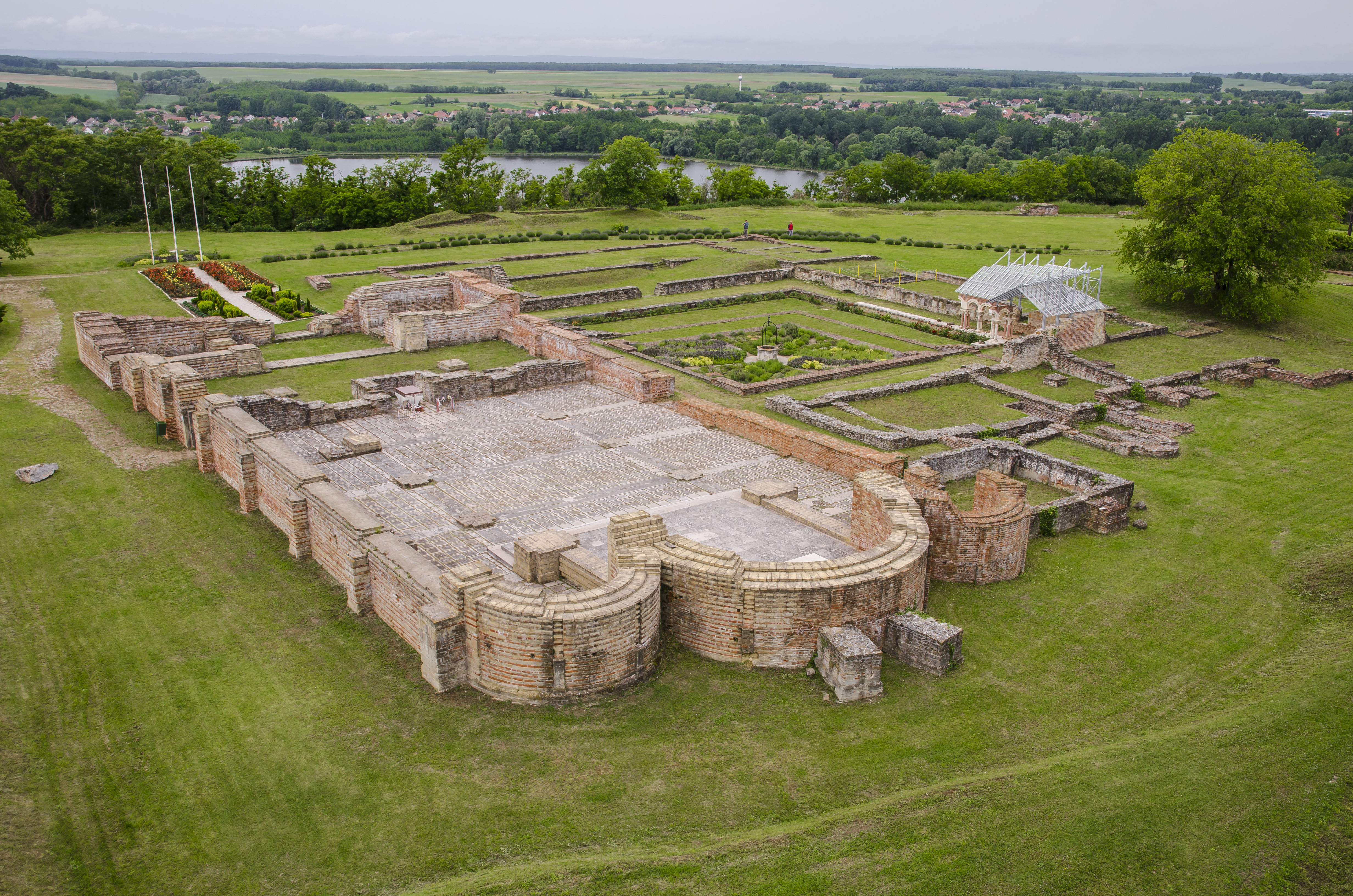 Szent Egyed bazilika és bencés apátság romjai, Somogyvár This is a photo of a monument in Hungary. Identifier: 8104